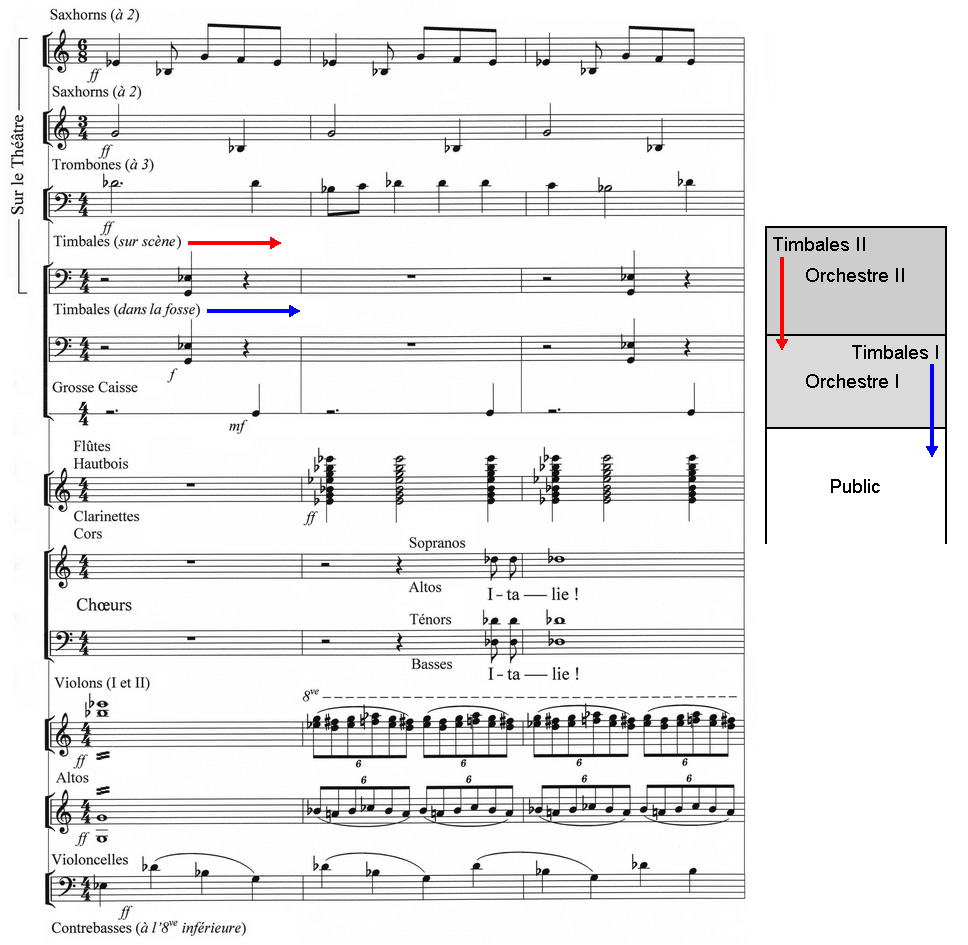 Berlioz Superpositions rythmiques des Troyens